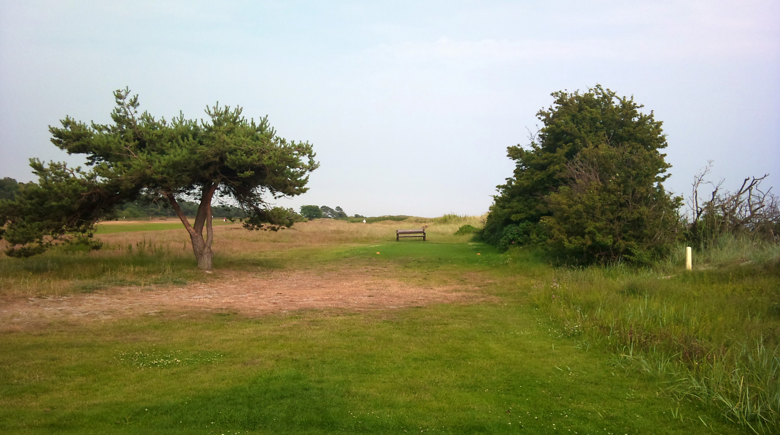 Ljunghusens golfklubb Ljunghusens GK 23:e tee